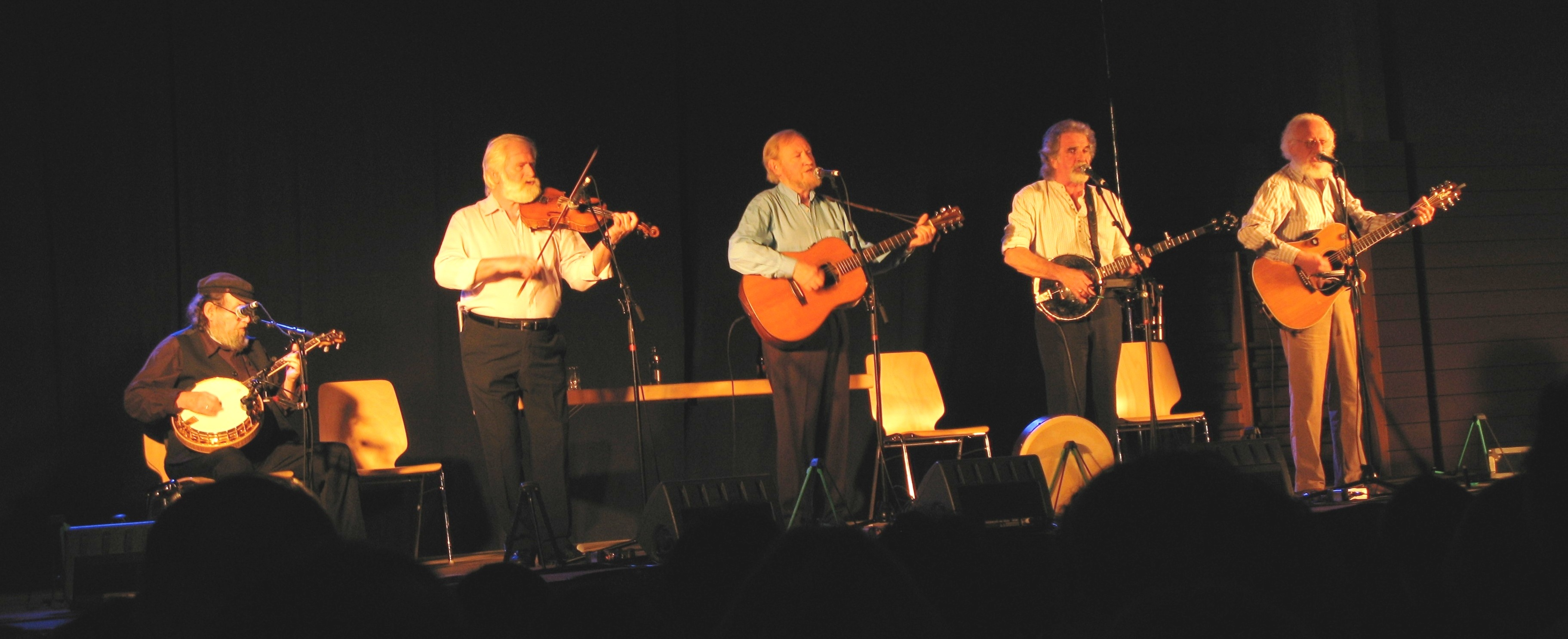 The Dubliners à Roodt-Syr (G-D de Luxembourg) en octobre 2008